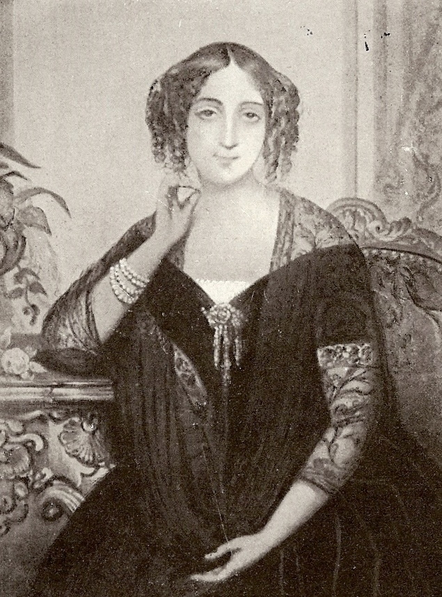 Olimpia Savio (1815-1889) Dipinto di autore sconosciuto, ca 1840, Museo del Risorgimento, Torino L'immagine si trova sul frontespizio del libro: Memorie della Baronessa Olimpia Savio scritto da Raffaello Ricci e pubblicato a Milano dai Fratelli Treves nel 1911